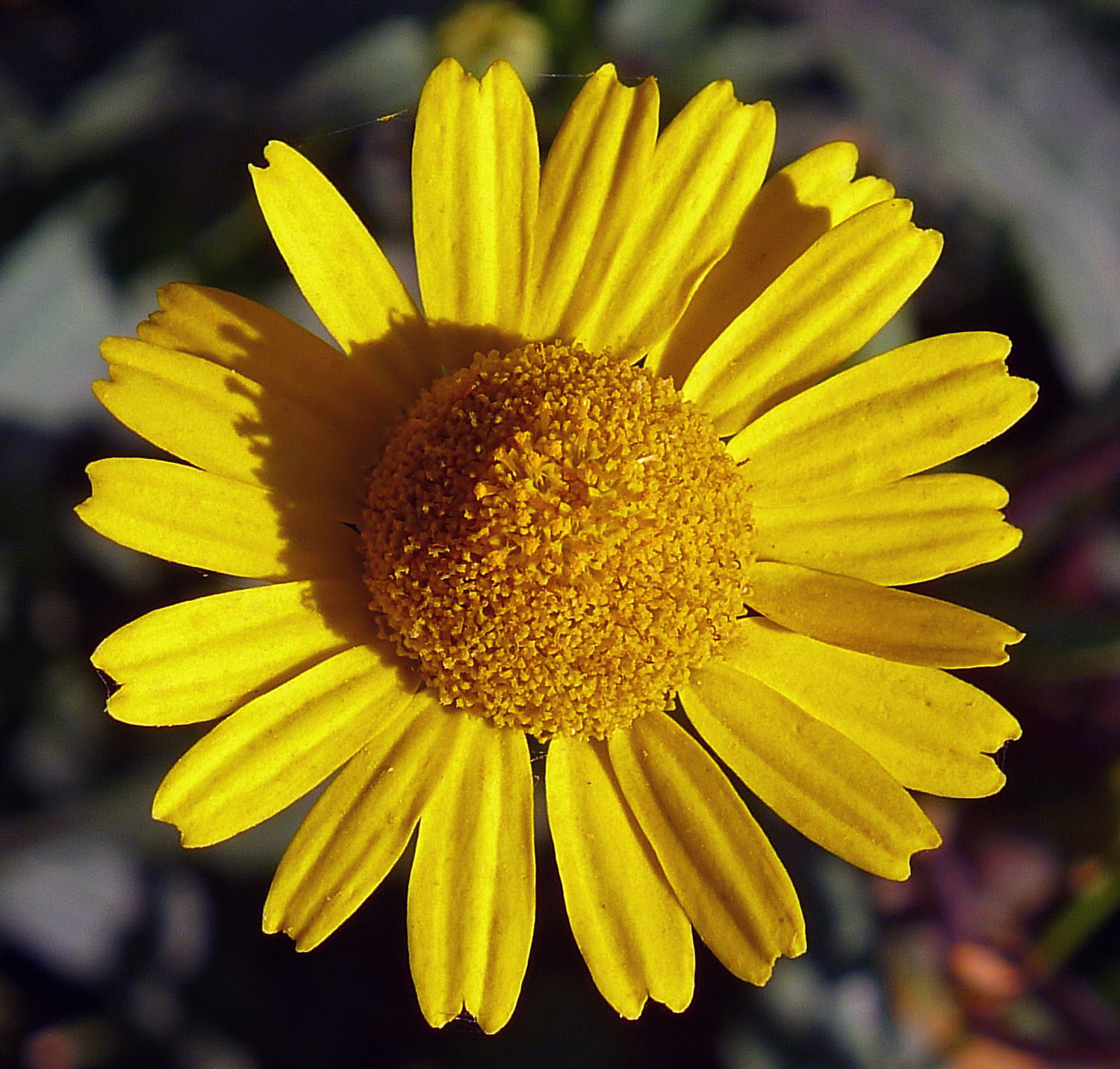 Coleostephus myconis (chrysanthème de Myconos) du jardin des Plantes de Paris